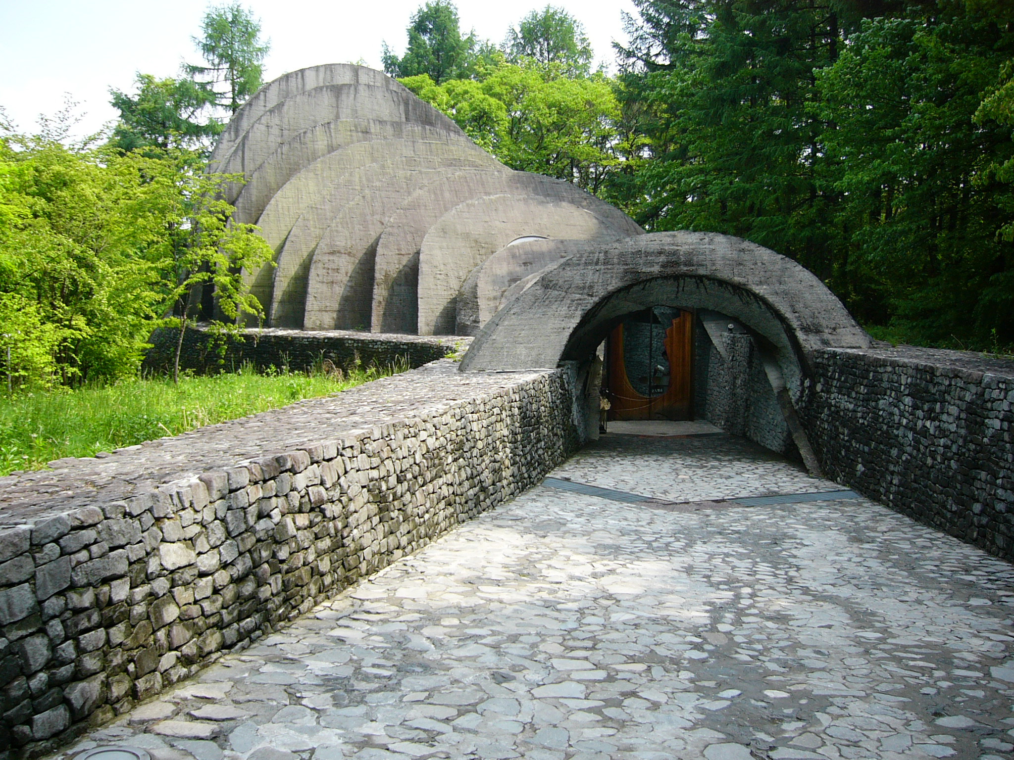 石の教会 内村鑑三記念堂 撮影者-663Highland，撮影日-2005年6月4日